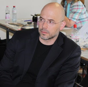 Arnd Zschiesche